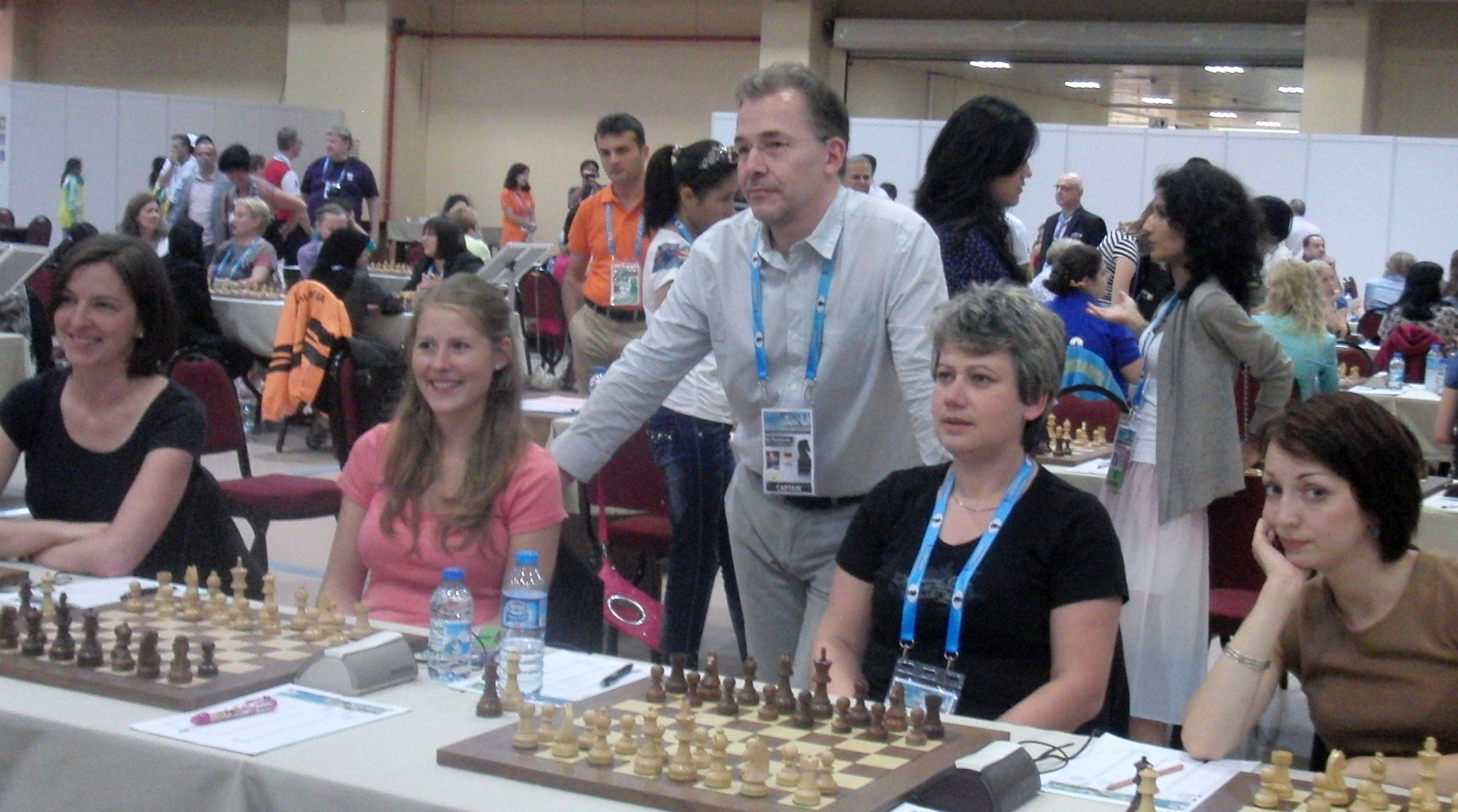 Das deutsche Damenteam (Marta Michna, Melanie Ohme, Tatiana Melamed und Elisabeth Pähtz), Schacholympiade 2012 in Istanbul.